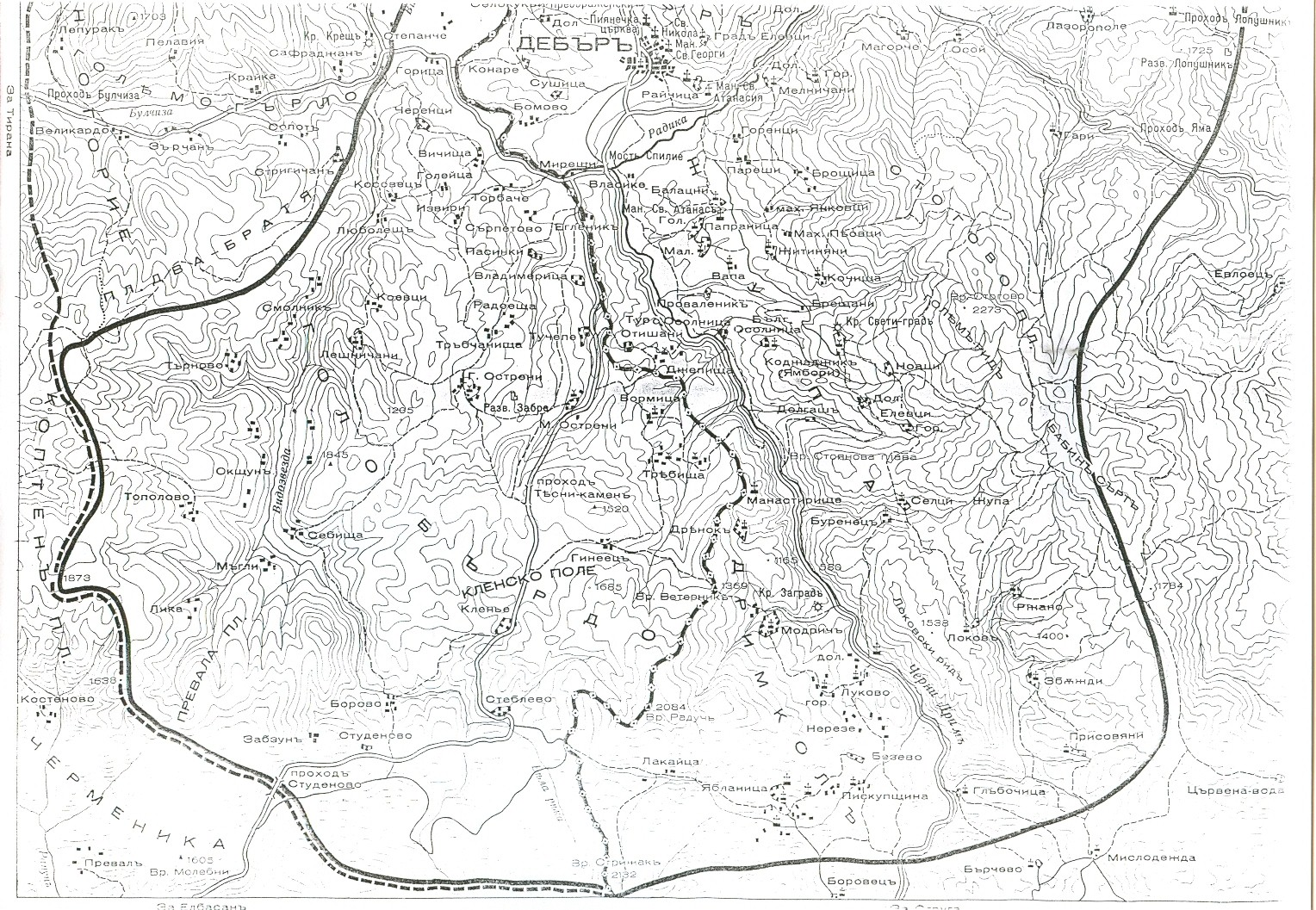 Карта на района на Голо бърдо в днешна Албания и част от Дебърско, днешна Република Македония. Първа половина на ХХ век.